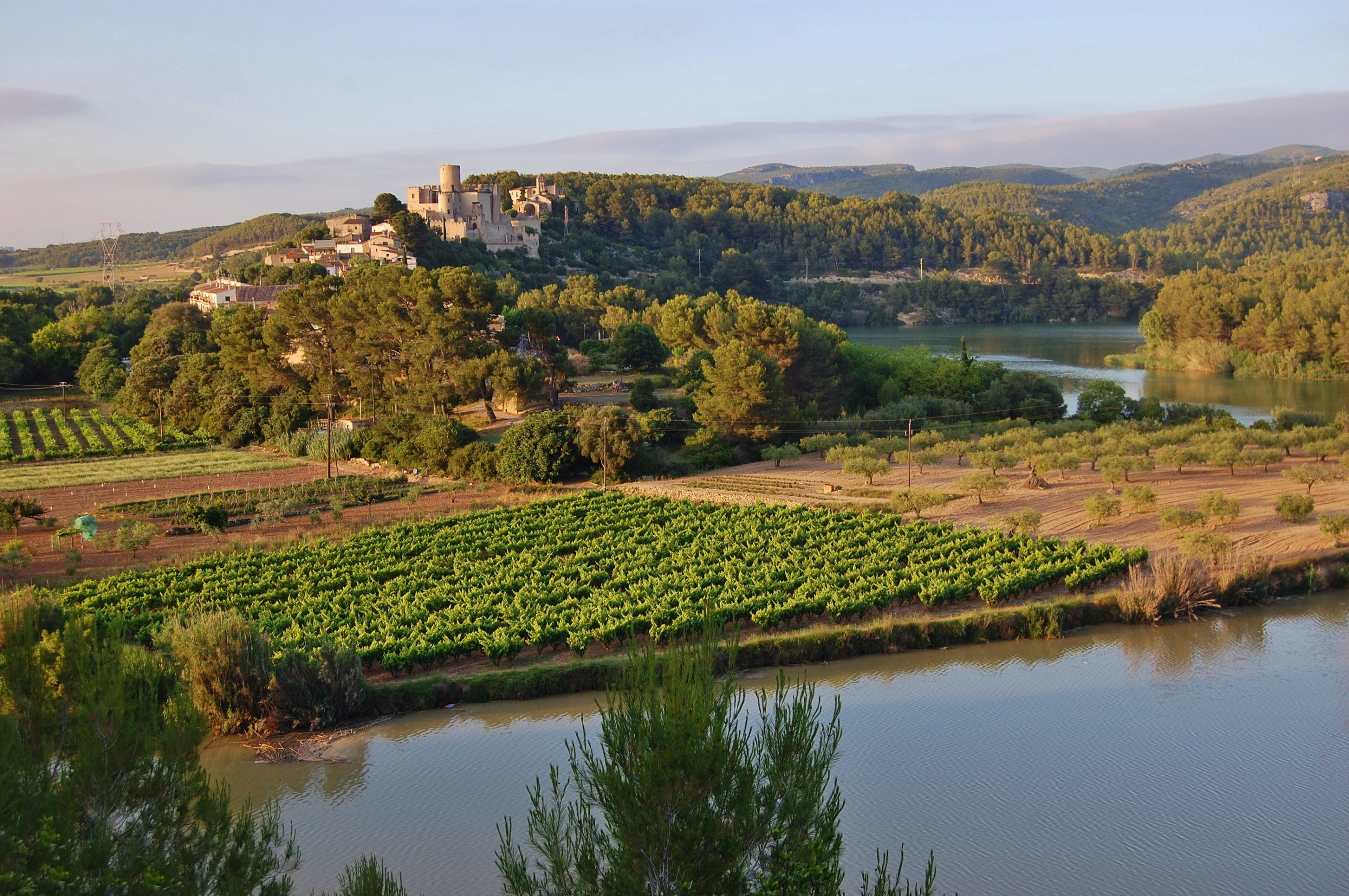 Castell de Castellet (Castellet i la Gornal)